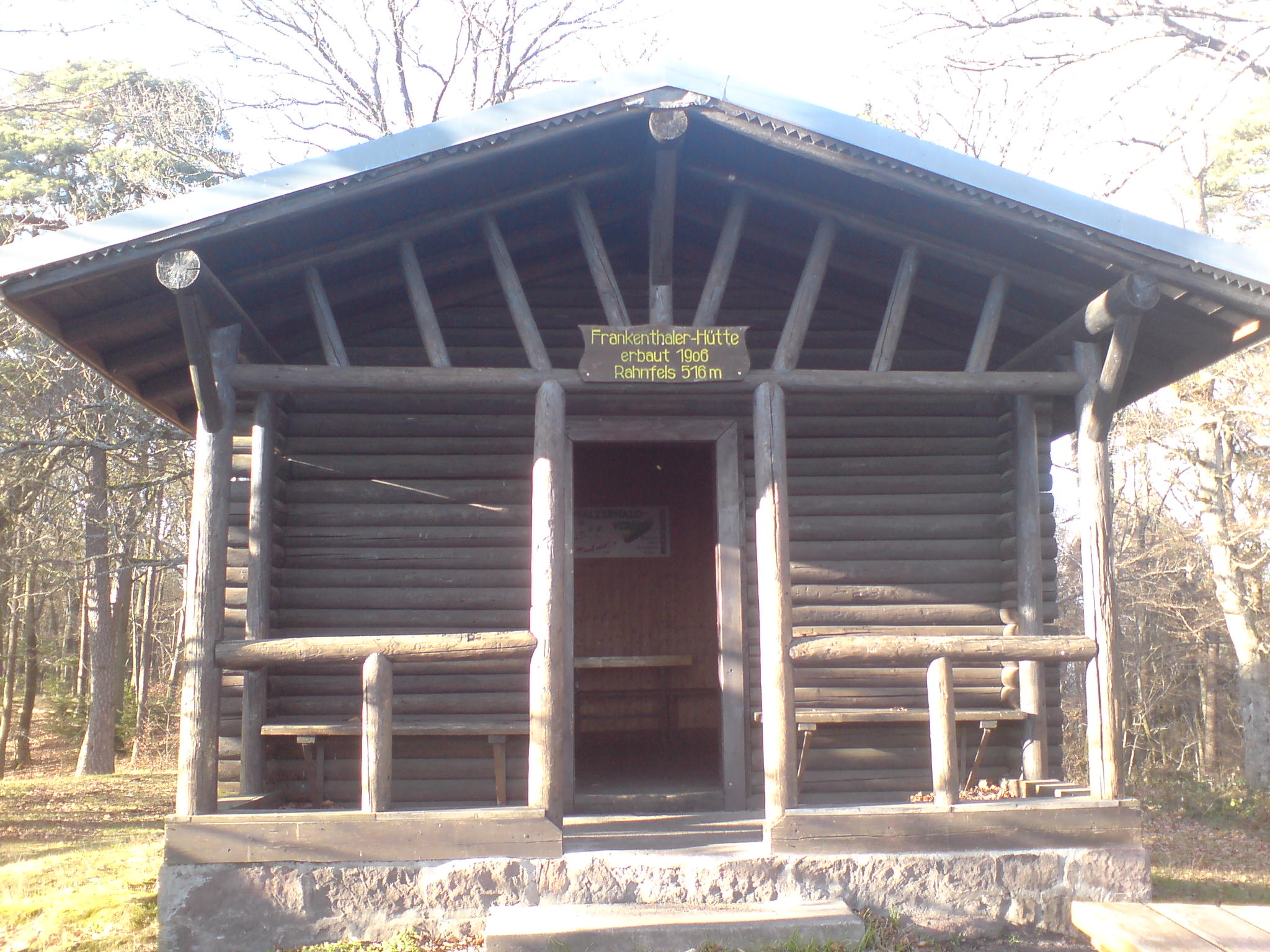 Die Frankenthaler-Hütte am Rahnfels bei Altleiningen.